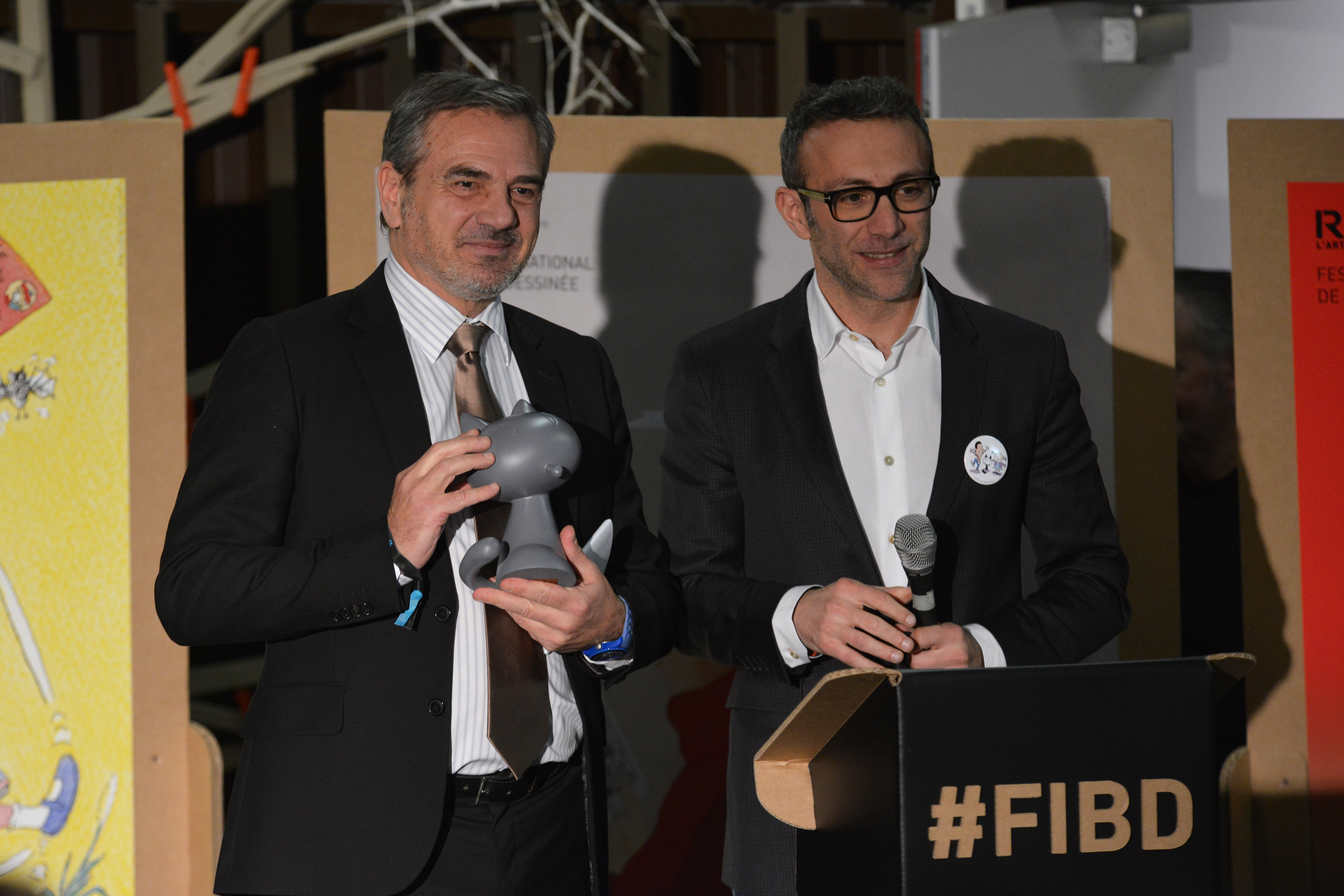 Remise du Grand prix par Stéphane Beaujean, directeur artistique du Festival de la Bande Dessinée d'Angoulême, attribué à la mangaka Rumiko Takahashi au directeur général des éditions Glénat, Jean Paciulli.